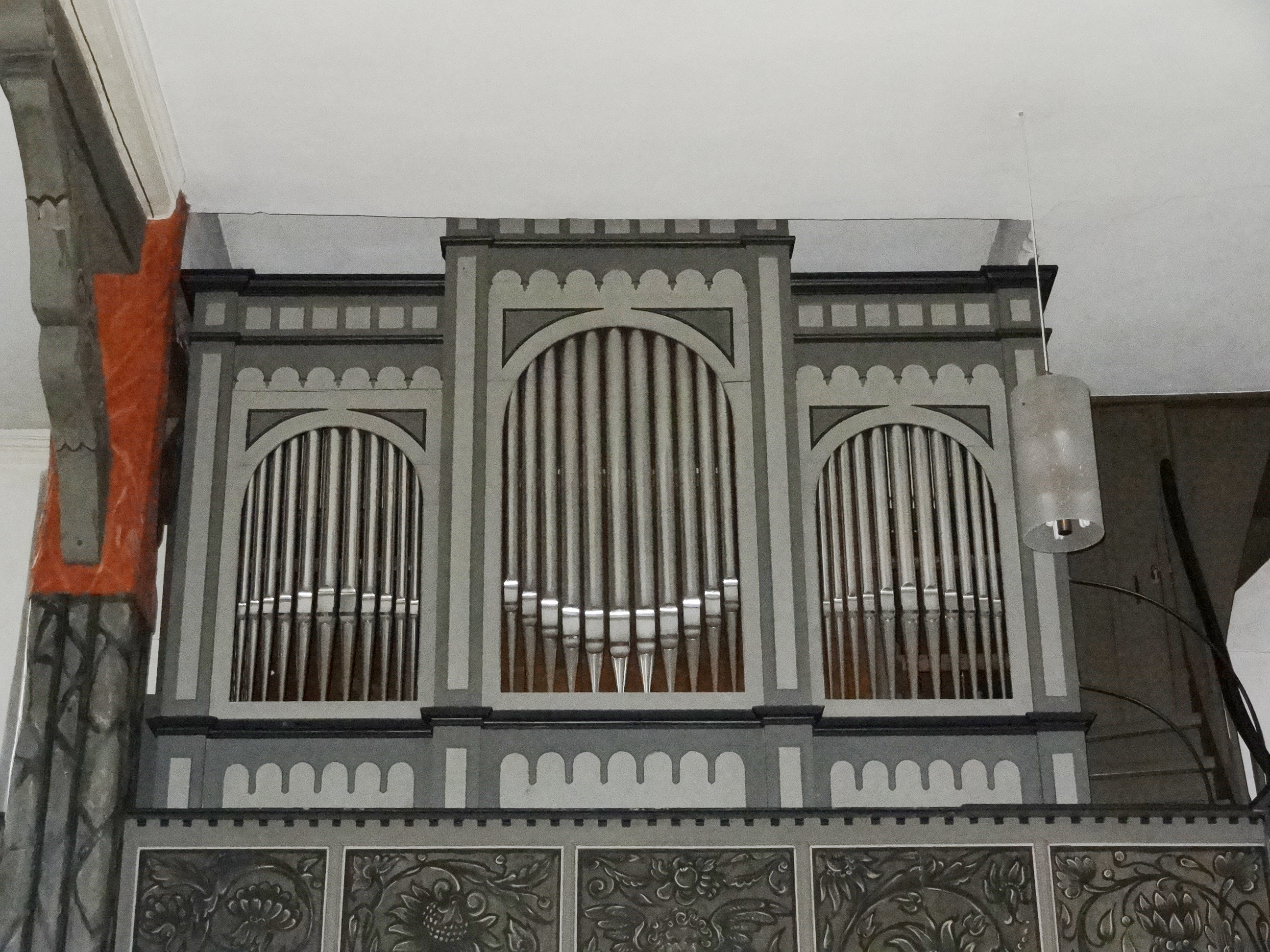 Ev. ref. Kirche Grüningen